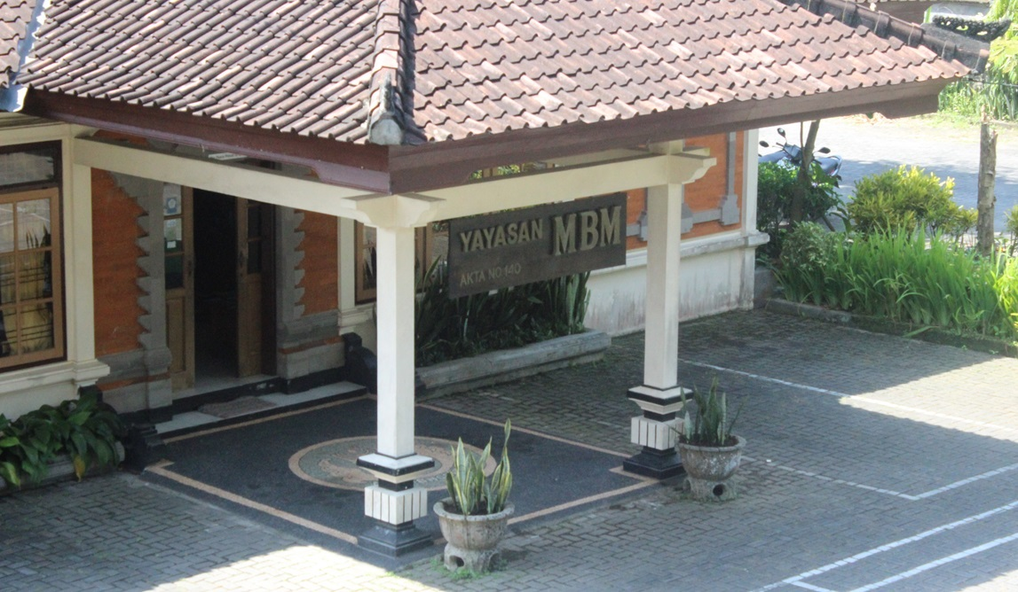 Yayasan MBM